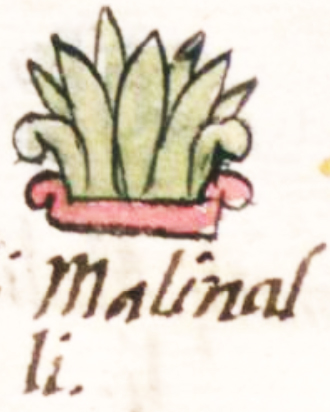 Malīnalli - glyphe 1 - B. de Sahagun - Codex Florentinus